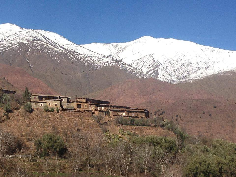 هذه صورة لدوار أهاشي المطل على نهر نفيس